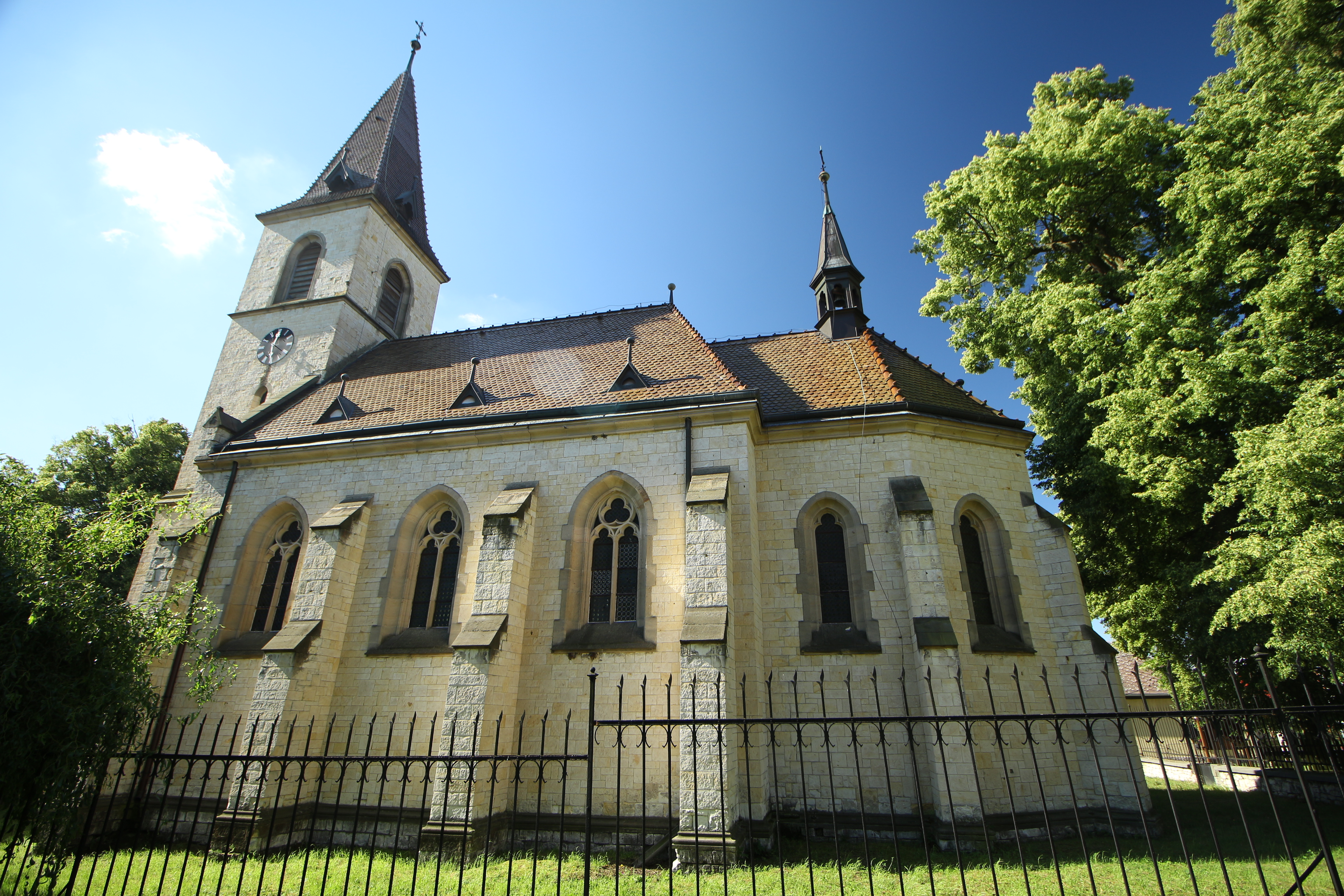 Kroučová